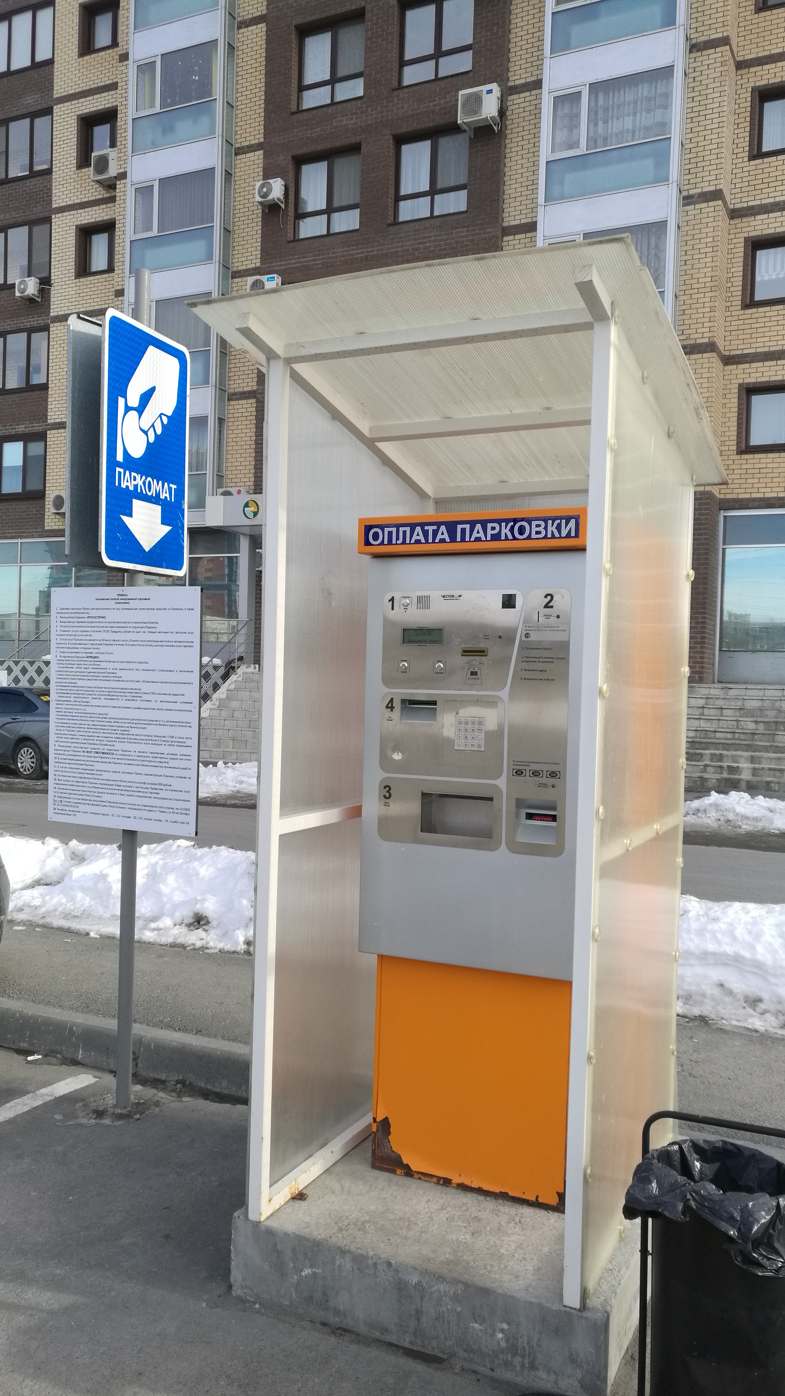 Parkumejo en strato Gorkij. Tjumeno, Rusio.